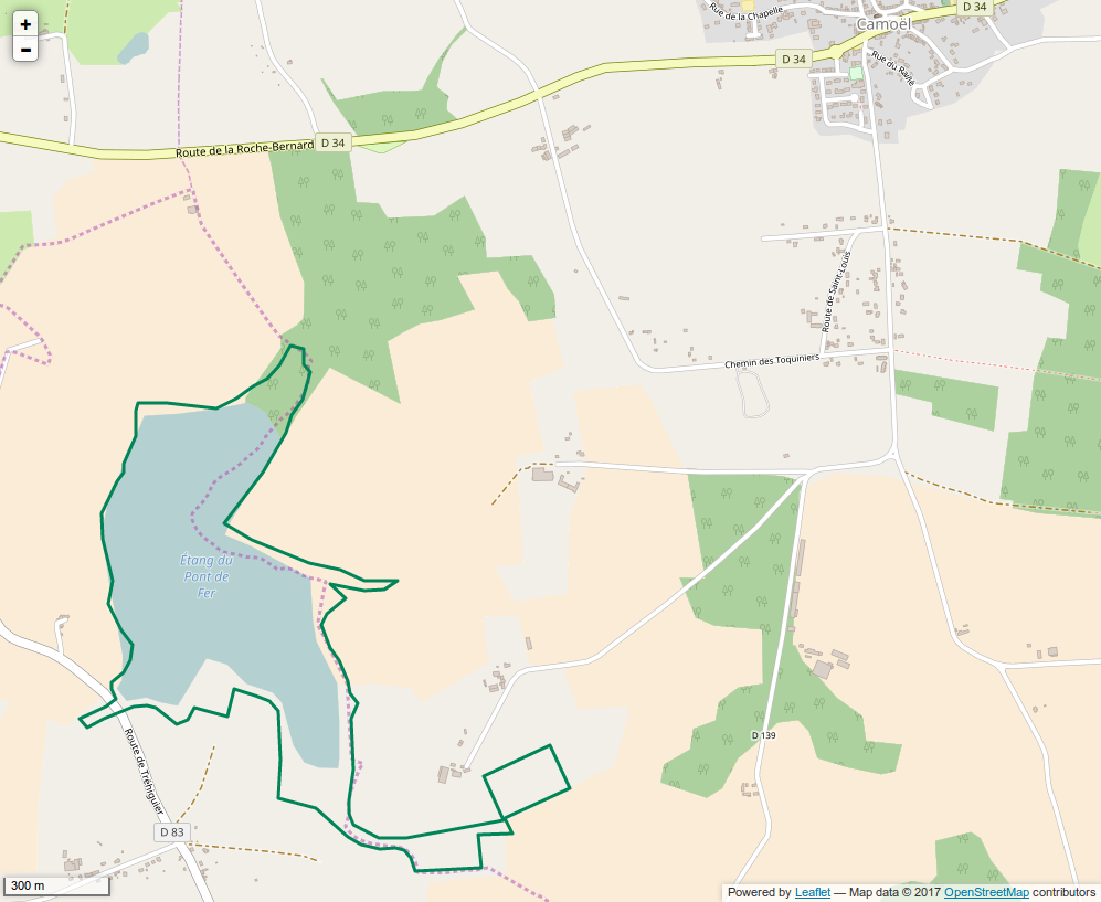 Périmètre de la RNR de l'Etang du Pont de fer.